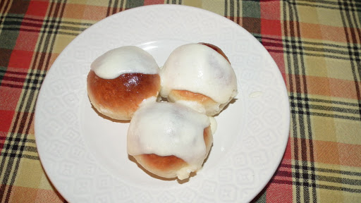 Adomynės dvaro "Pagrabinės" bandelės